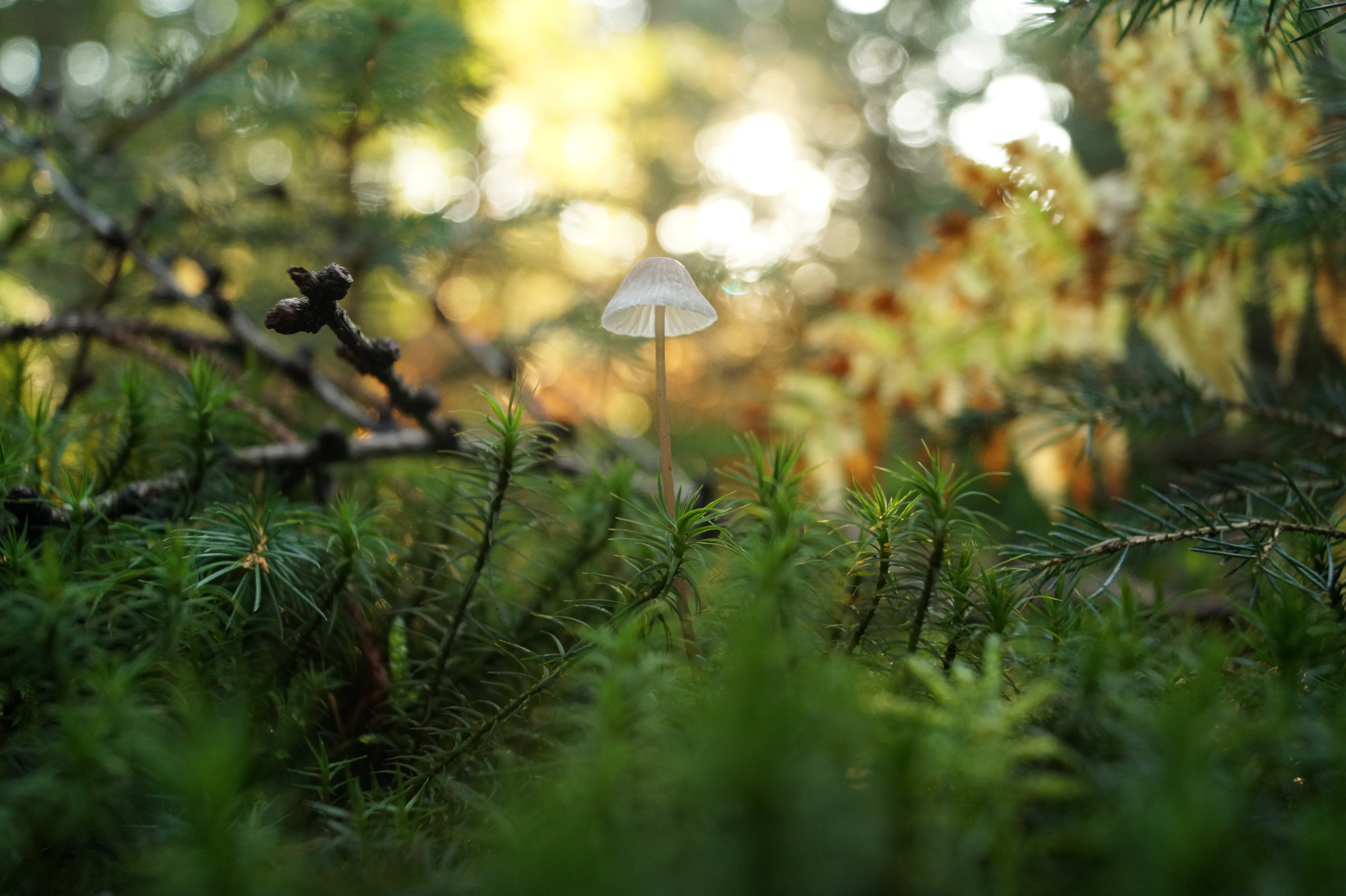 Pilz und Moose im Waldgebiet Schluchter Heide; Naturschutzgebiet „Gierather Wald“ (NSG GL-057) in Bergisch Gladbach